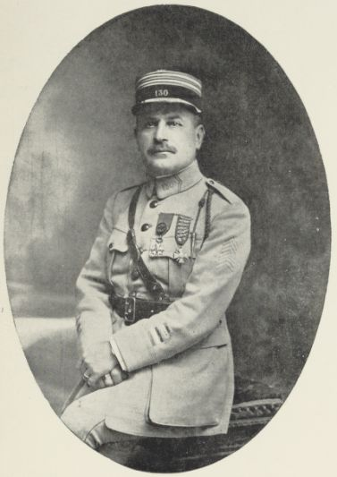 Le lieutenant-colonel Rousseau du 130e régiment d'infanterie, ancien commandant du 120e bataillon de chasseurs (13 mars 1915—7 février 1917)